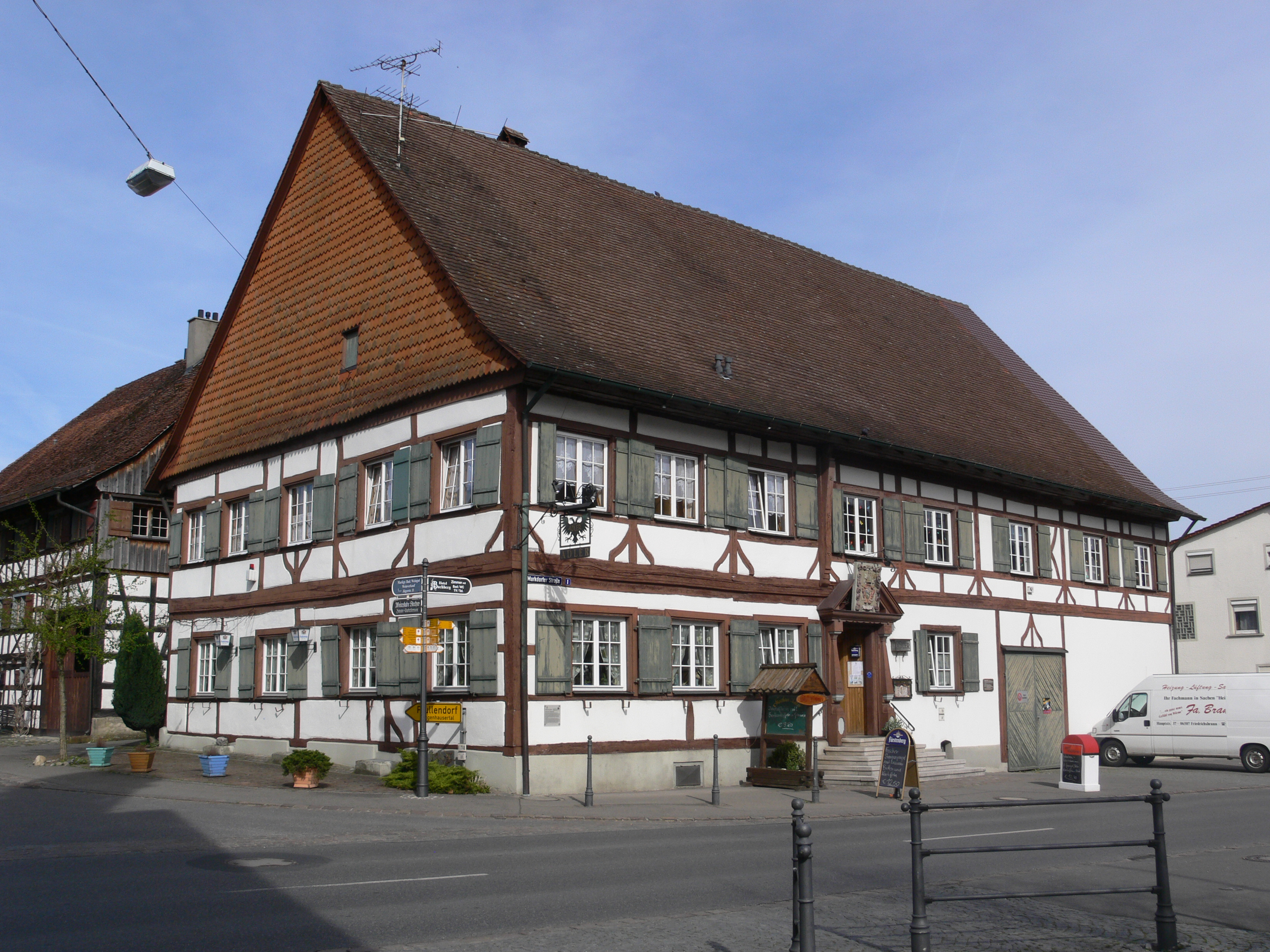 Bermatingen, Bodenseekreis: Gasthof Adler